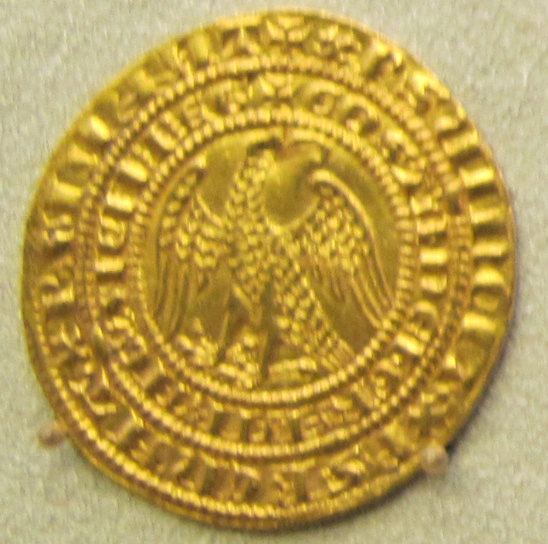 Napoli, costanza e pietro d'aragona, pierreale d'oro, 1282-85